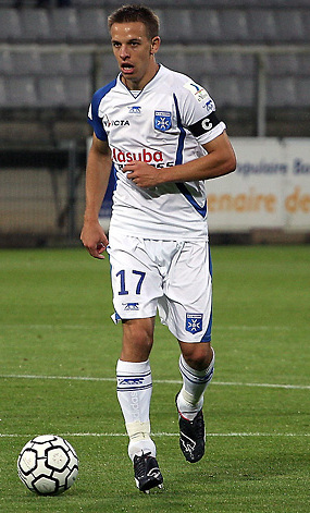 benoit pedretti